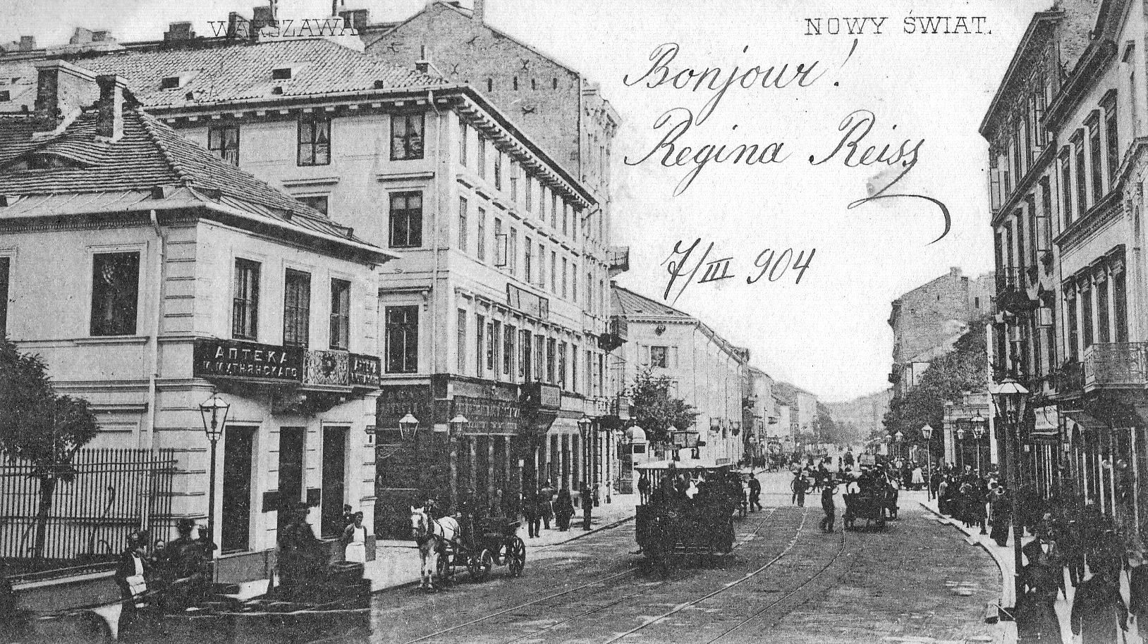 Ulica Nowy Świat w Warszawie, widok w kierunku południowym